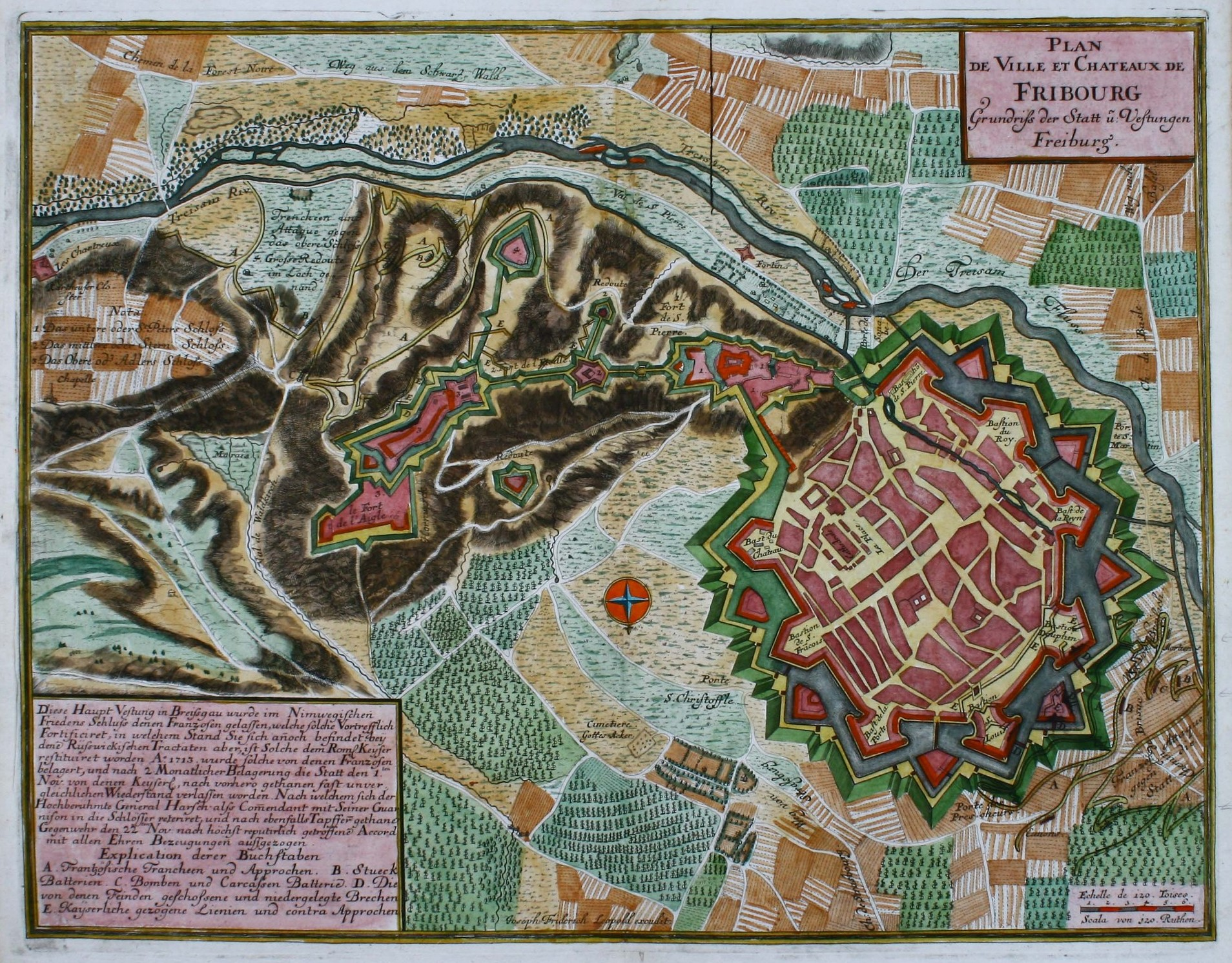 "Fribourg - Grundriss der Statt u: Vestungen Freiburg", Freiburg, Grundriss der Stadt und Festung Freiburg.